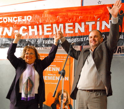 Foto tomada en el almuerzo de lanzamiento de la campaña